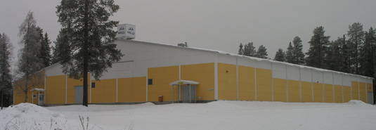 Suomussalmen jäähalli Ämmänsaaressa